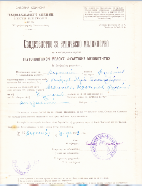 Сертификат за етническо малцинство на Георги Илия Поплазаров от с. Връбник, днешна Албания - 1923 г.